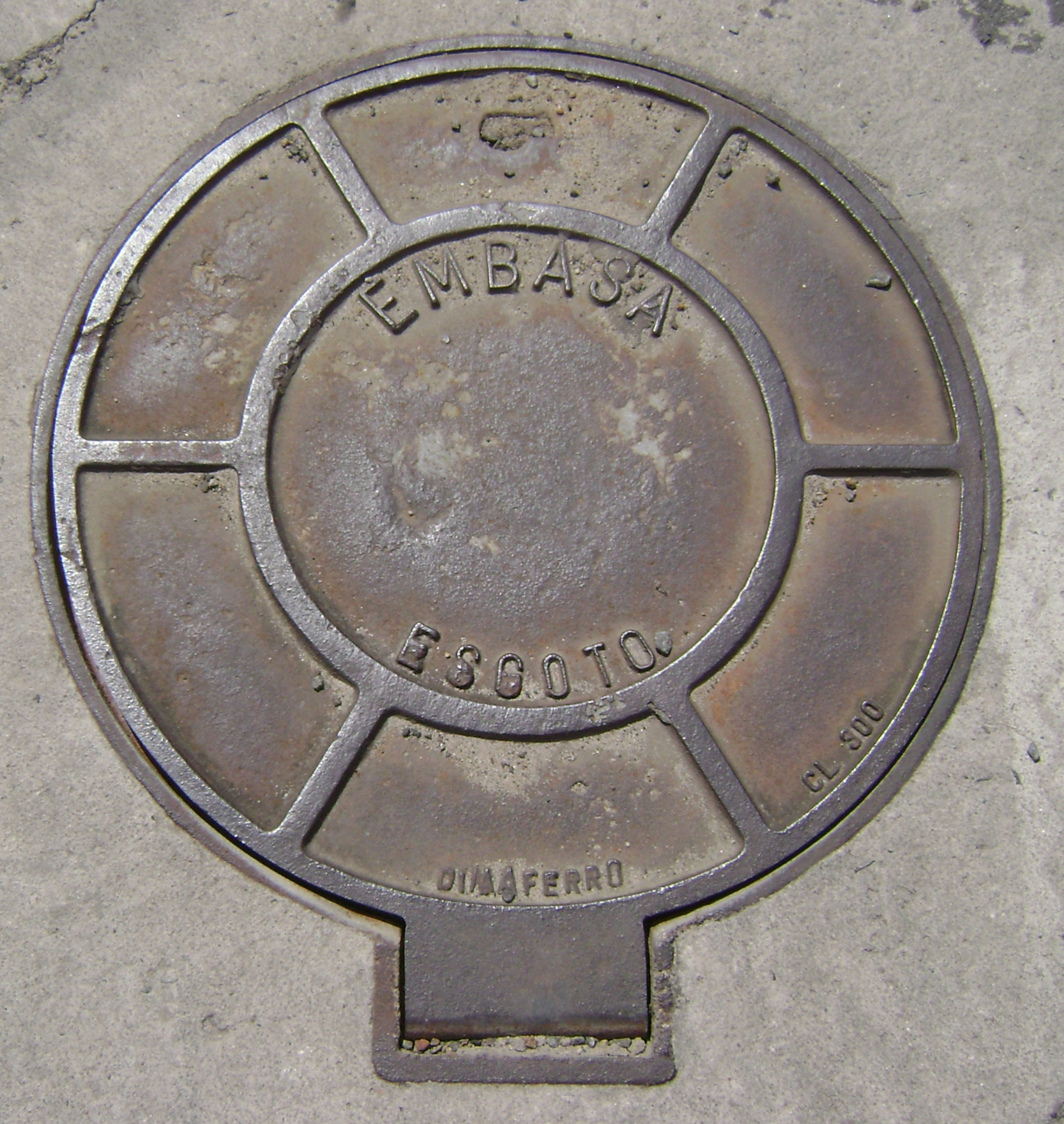 Bueiro da EMBASA em Feira de Santana, Bahia.